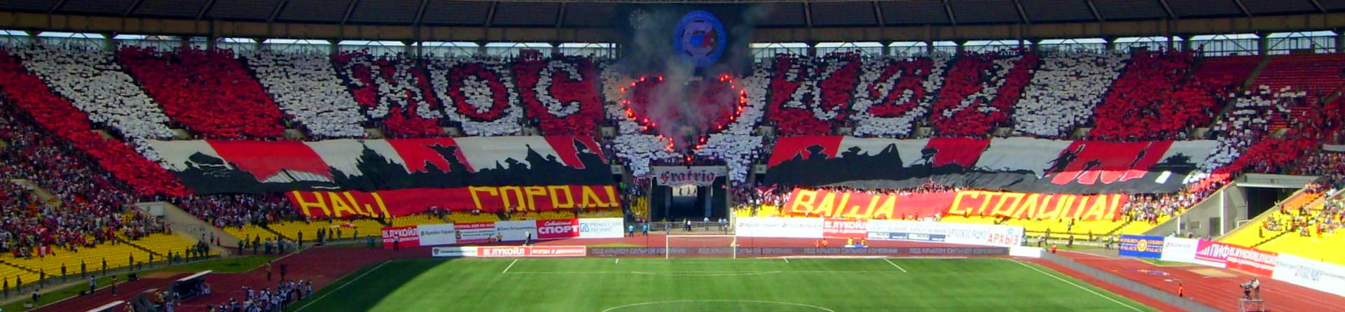 Перфоманс "Москва. Наш город, ваша столица!"